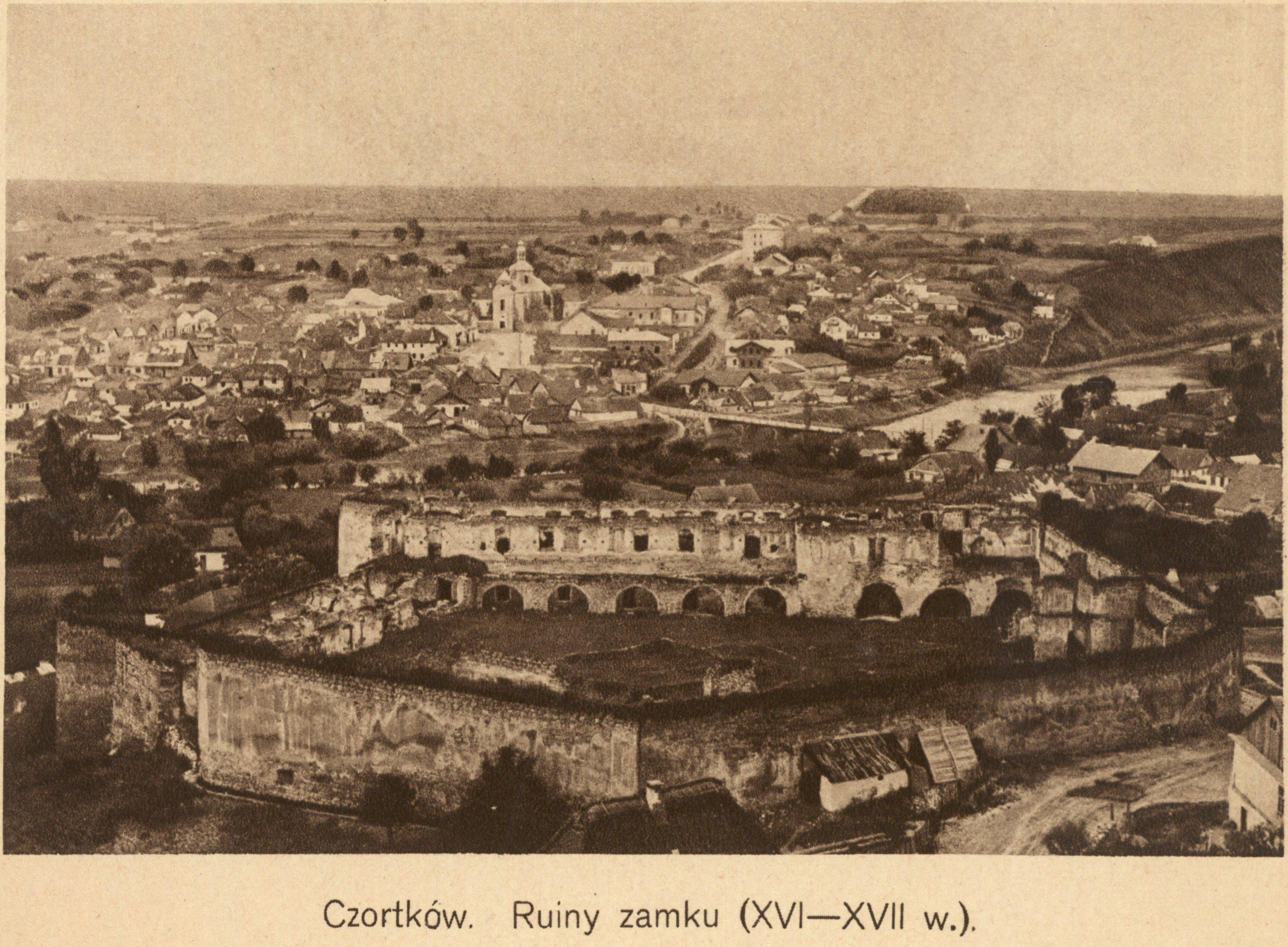 Руїни замку в Чорткові.